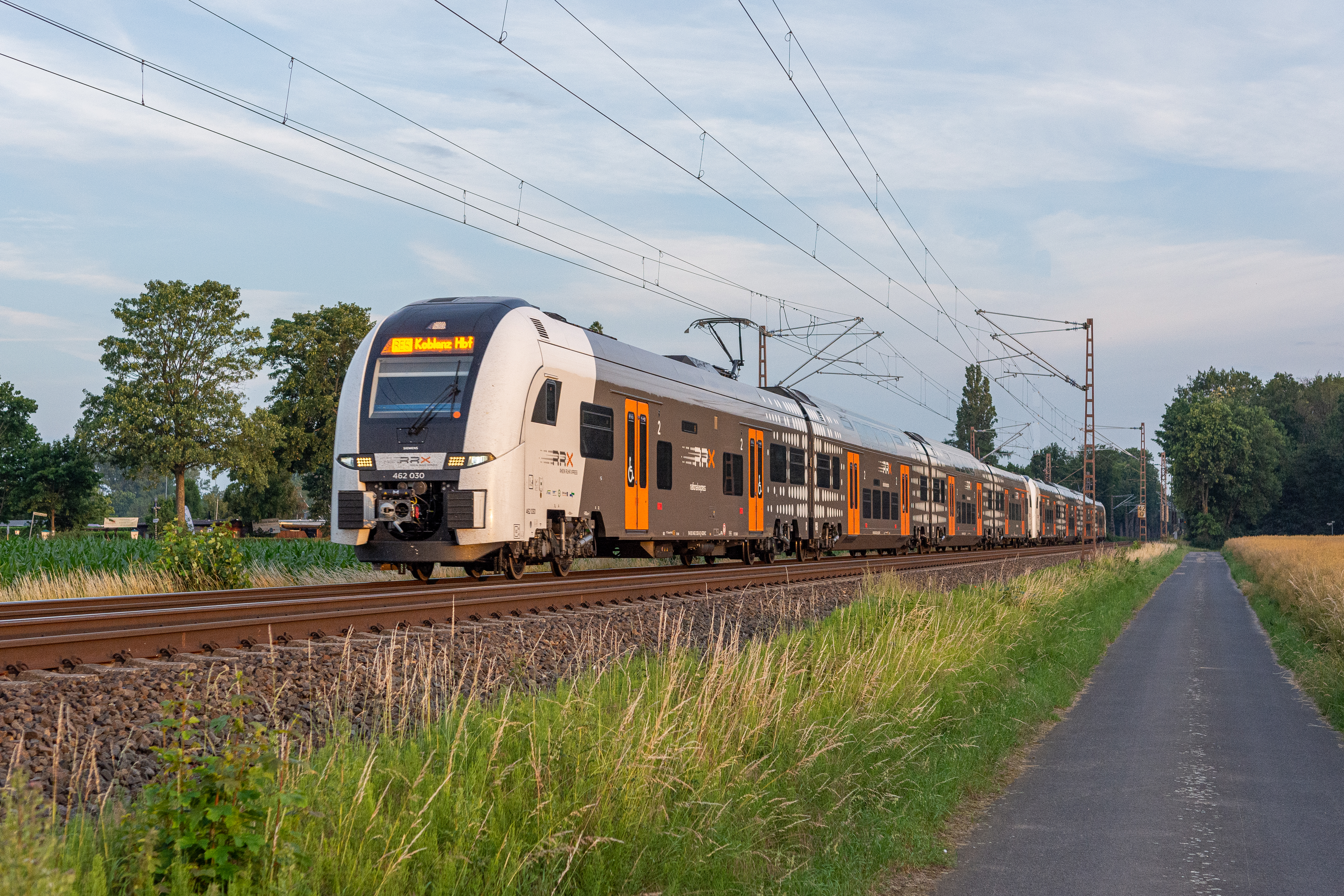 Ruim een week geleden maakte ik bij een opkomende zon al een plaatje van deze treinstellen. Nu bij iets meer licht en een paar minuten later...RRX Siemens Desiro HC dubbeldecks-stellen 462 030-462 018 rijden om 5.50 uur in de ochtend bij Haldern, als RE5 naar Koblenz Hbf.